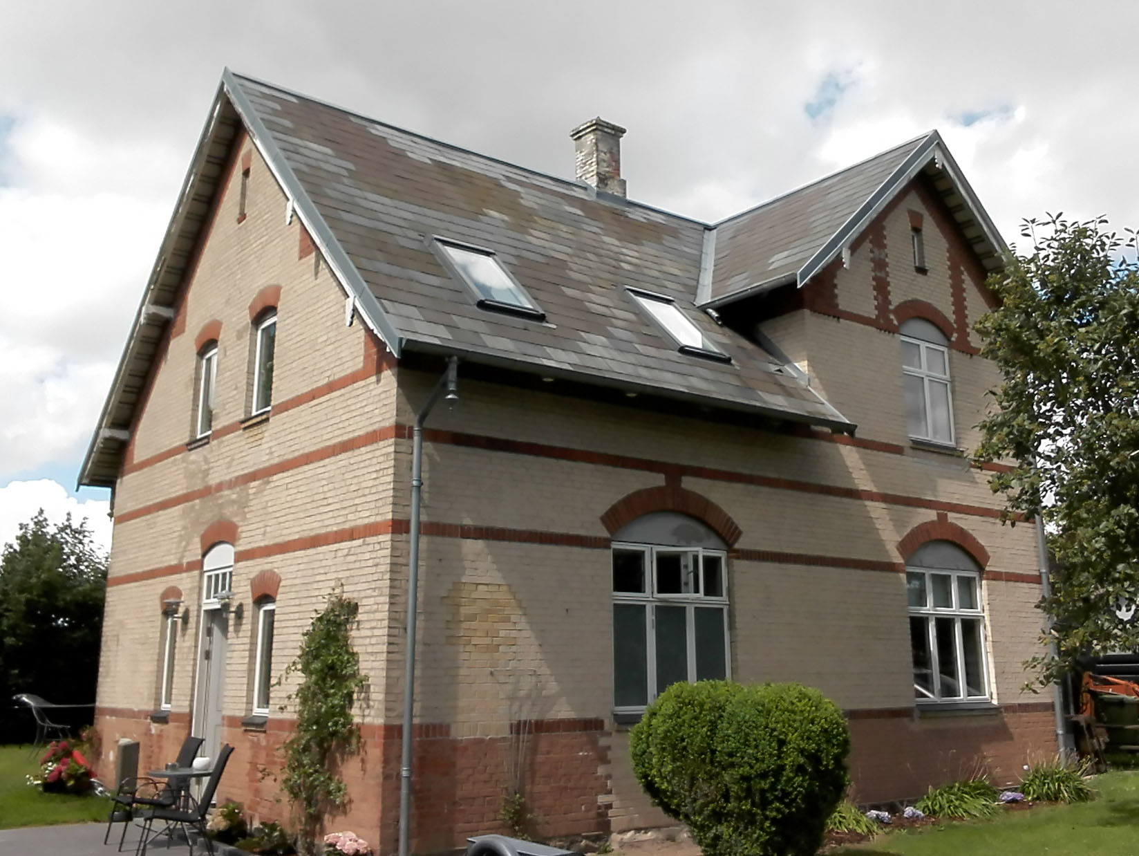 Oure Station, vejsiden fra sydøst